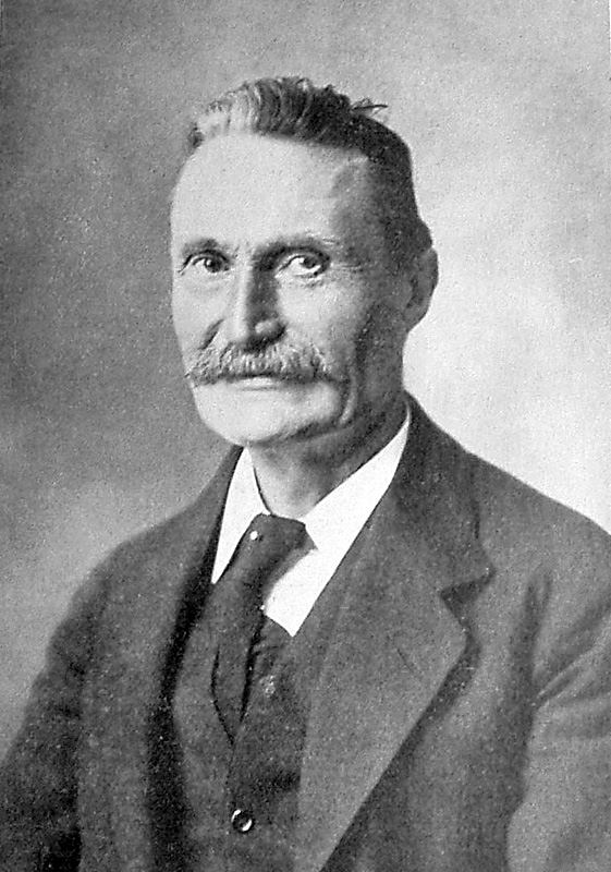 Carl Julius Otto Liebe (født 24. maj 1860, død 21. marts 1929). Dansk jurist og statsminister fra 30. marts 1920 til 5. april 1920.